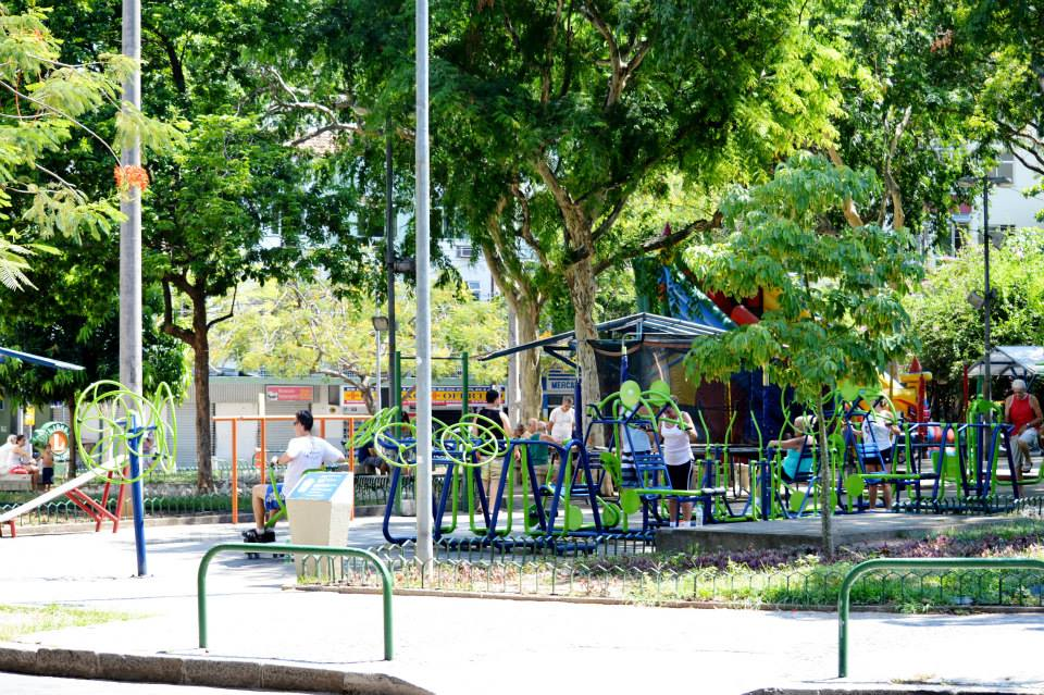 Foto da praça edmundo rego